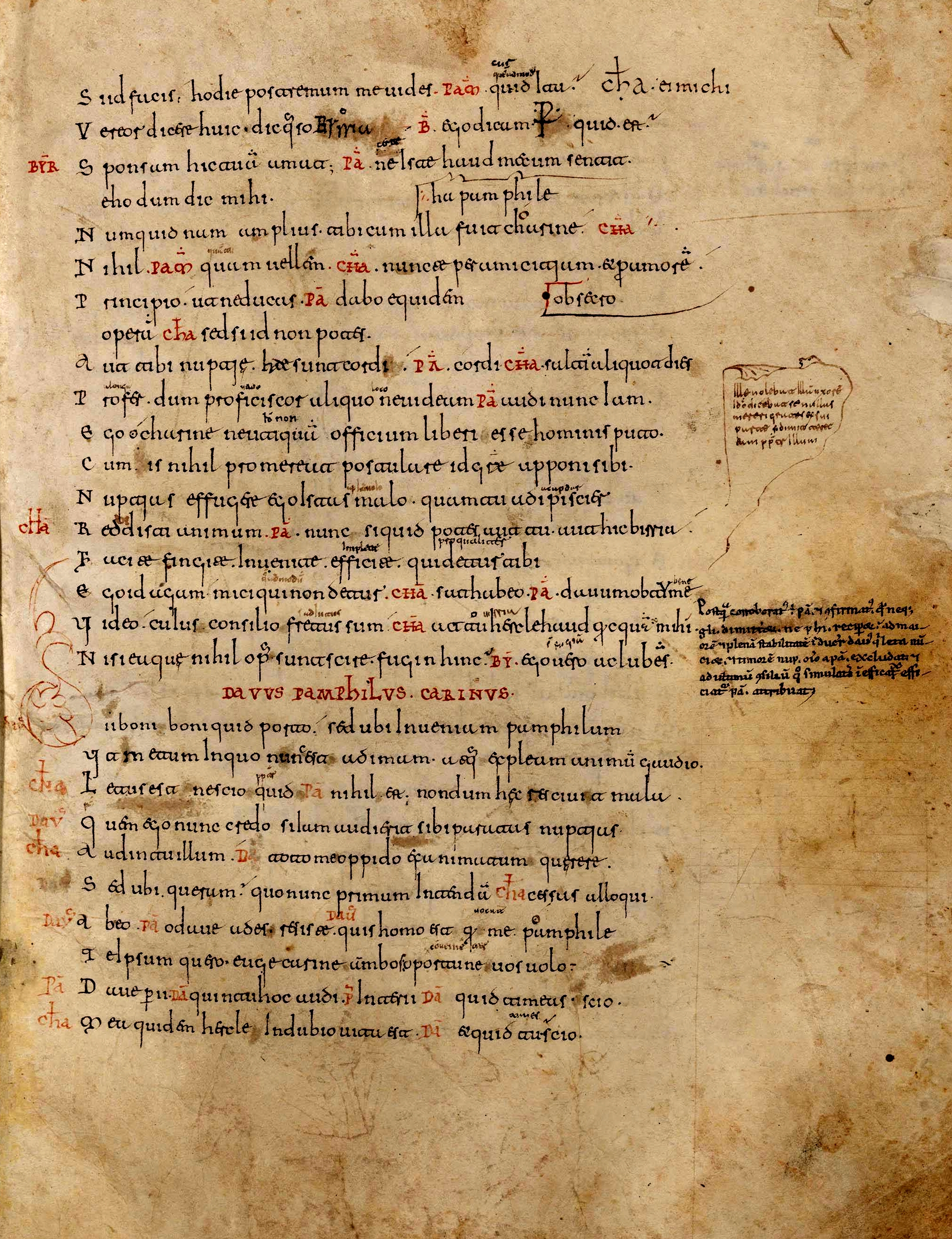 Terencio, Comedias, manuscrito del siglo XI. 96 hojas en pergamino. Biblioteca Nacional de España, Vitr/5/4. Contiene: Andria [a falta del inicio] (hojas 1-17), Eunuco (17v-37), Heauton Tymerumenon (37-48 y 77-74), Adelfos (48-65), Hécira (65-73). Formión [a falta del final] (73-76 y 85-96v)